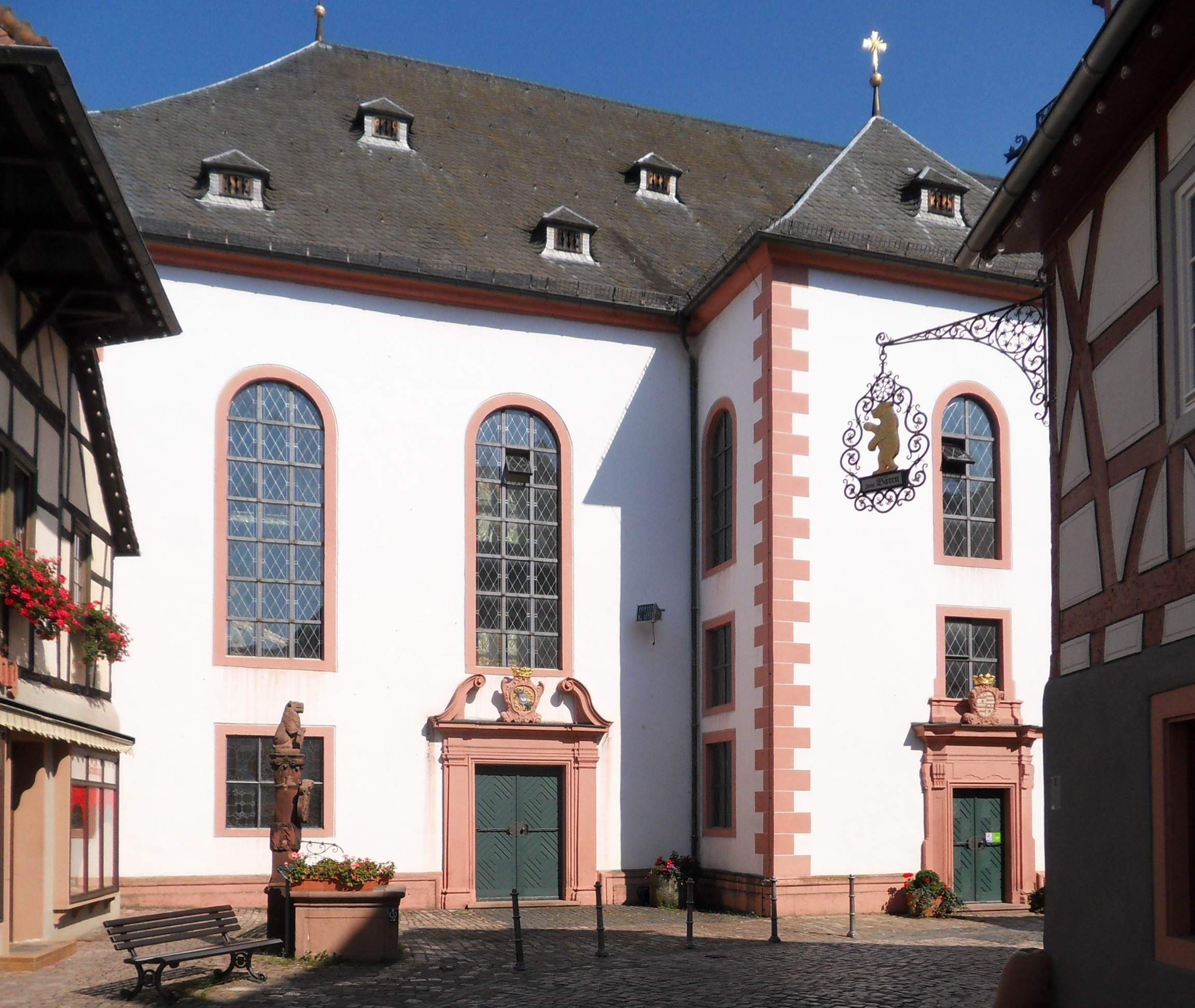 Portalseite der Evangelischen Stadtkirche Im Städtel 3 in Erbach (Odenwald)